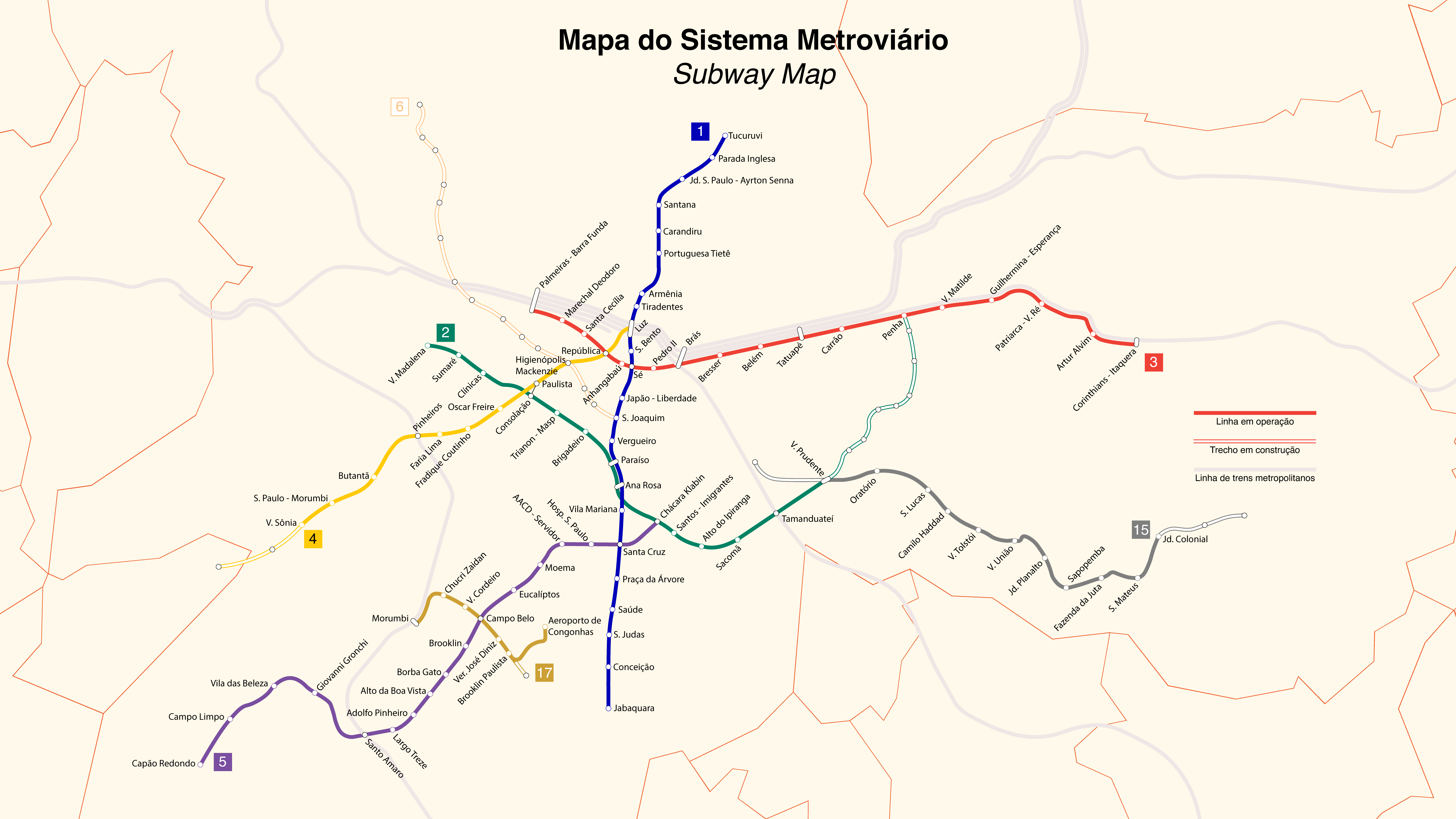 Mapa do Metrô de São Paulo em escala, data de agosto de 2019.